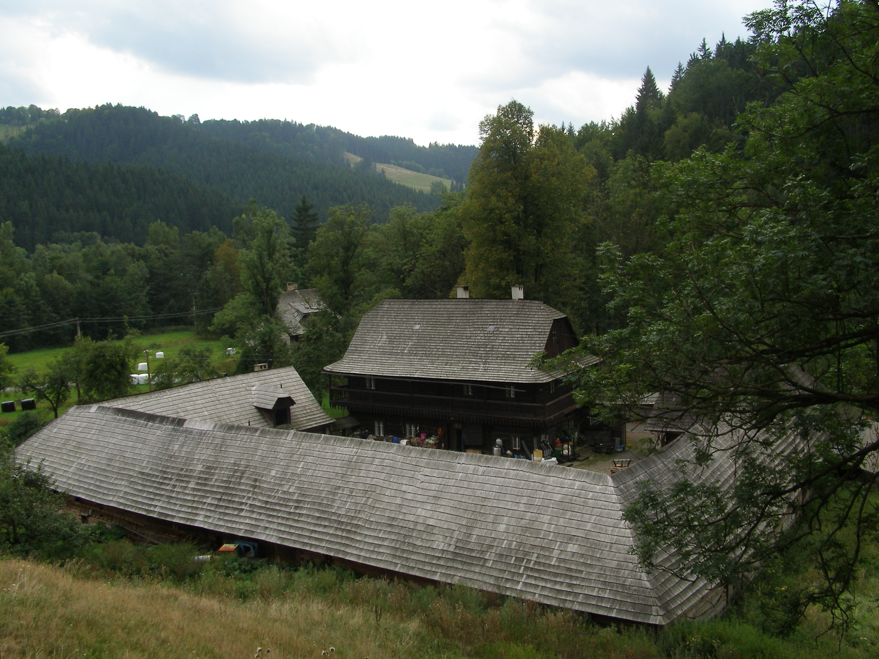 Fojtství (Velké Karlovice), Velké Karlovice 23